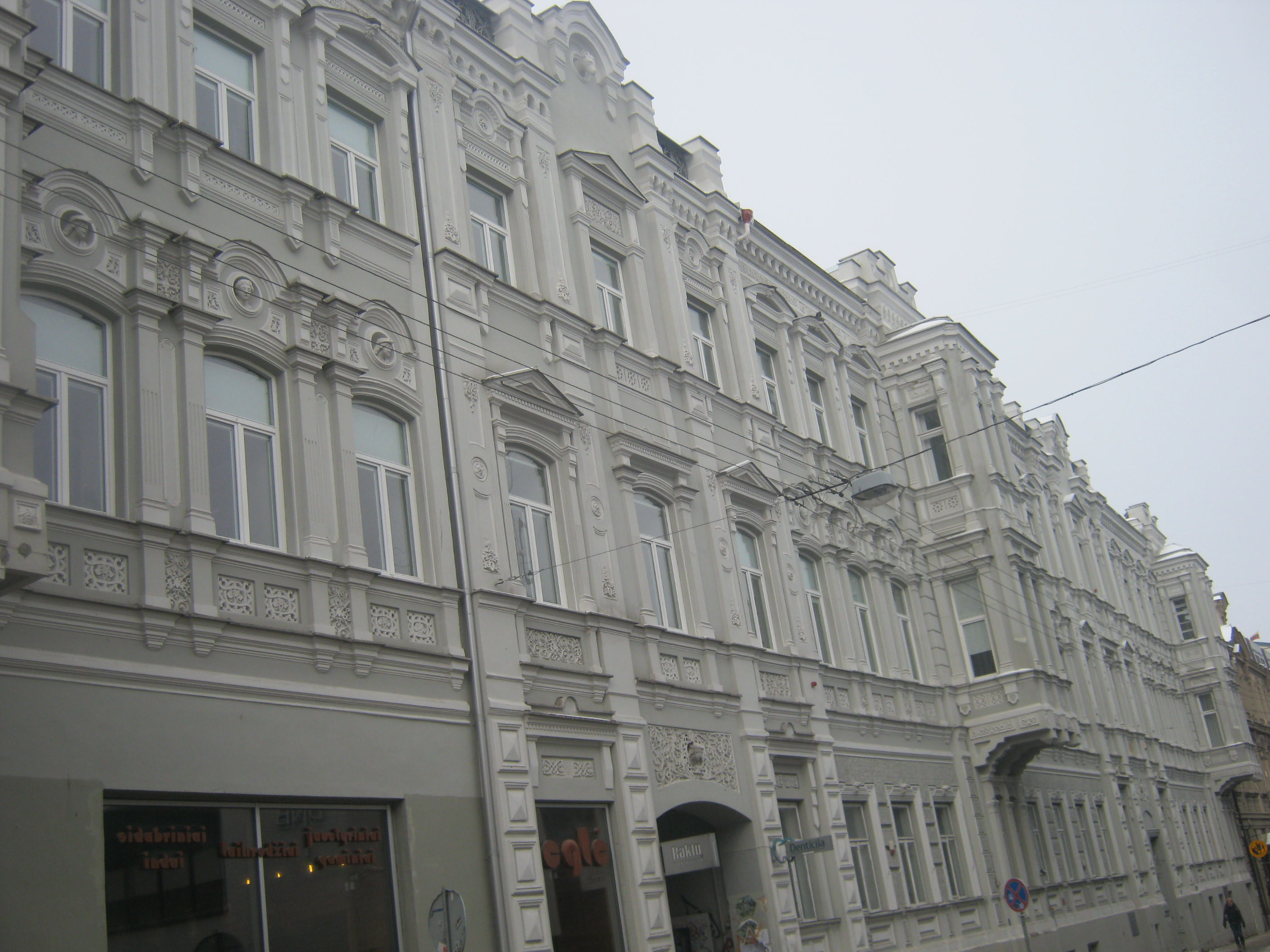 Vilniaus g. 25, Vilnius